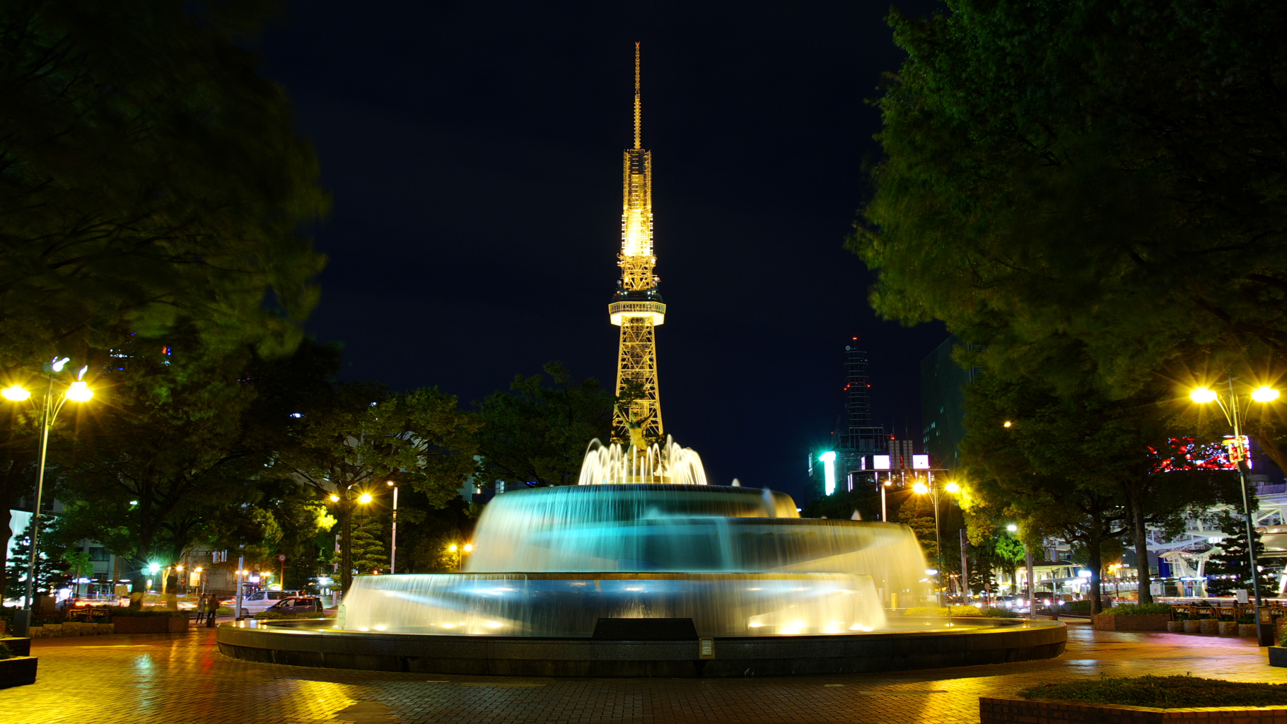 名古屋テレビ塔・希望の泉をはじめとする久屋大通公園の夜景